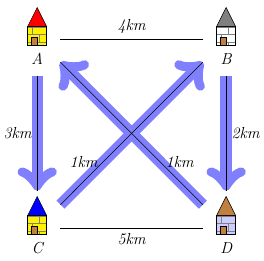 Problème du voyageur de commerce ː solution optimale